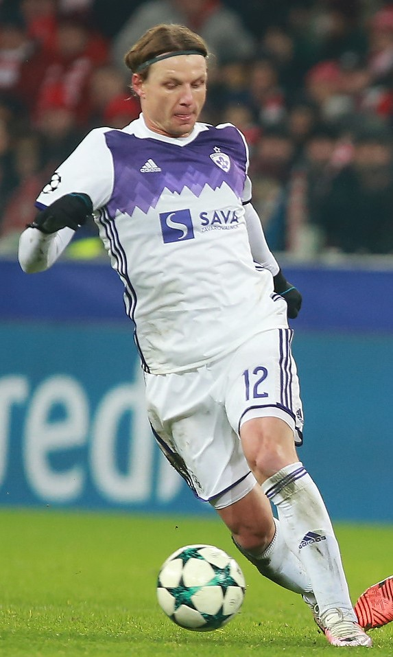 Dare Vršič